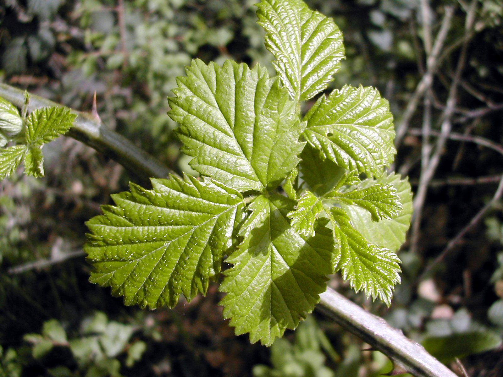 Author: David Gaya Parc de Sant Llorenç de Munt